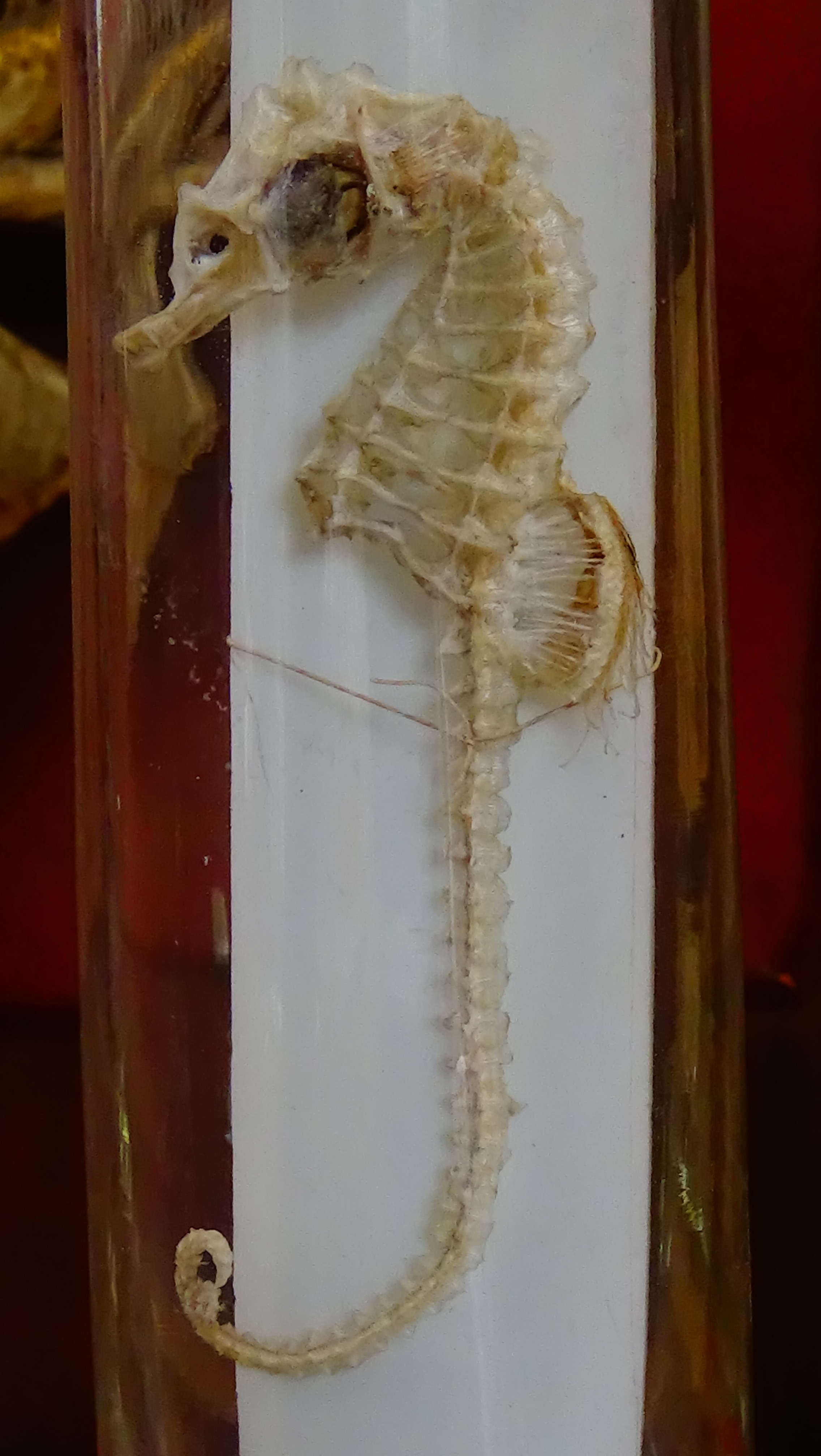 Hippocampe - squelette MNHN - Hippocampus